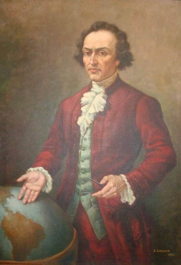 Retrato del sabio Pedro Vicente Maldonado, por Enrique Gomezjurado.